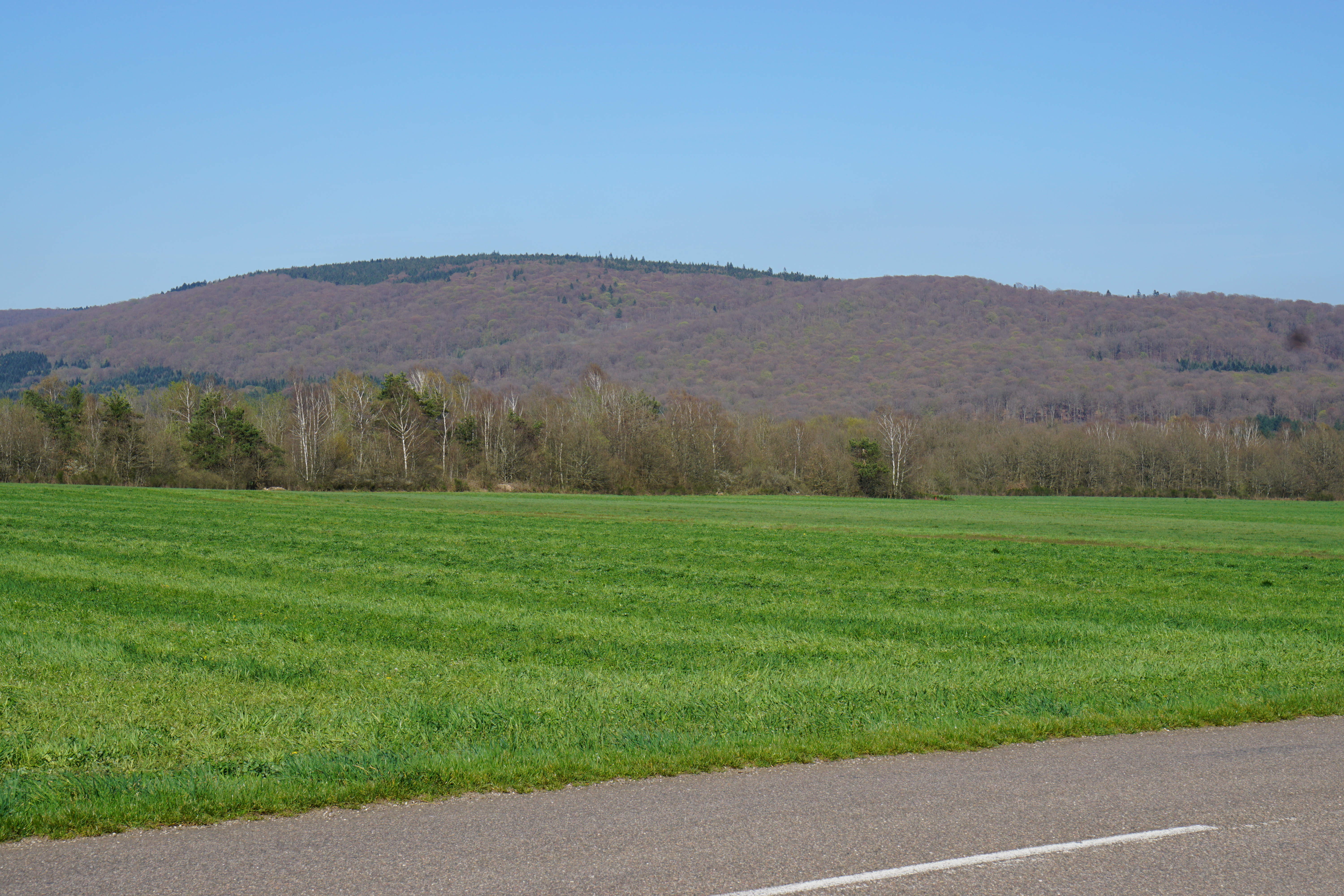 Mont de Vannes depuis Malbouhans.